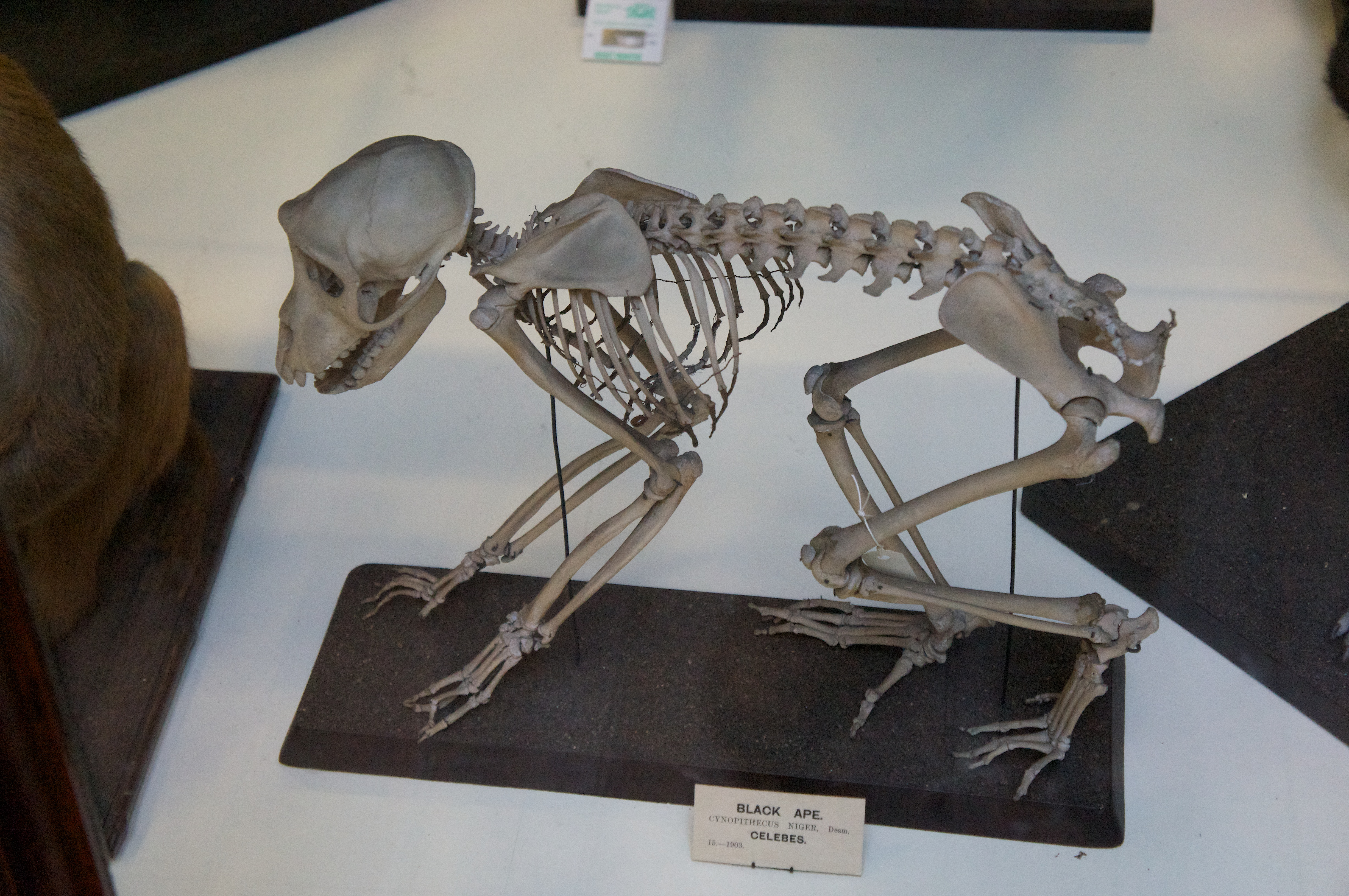 Black ape